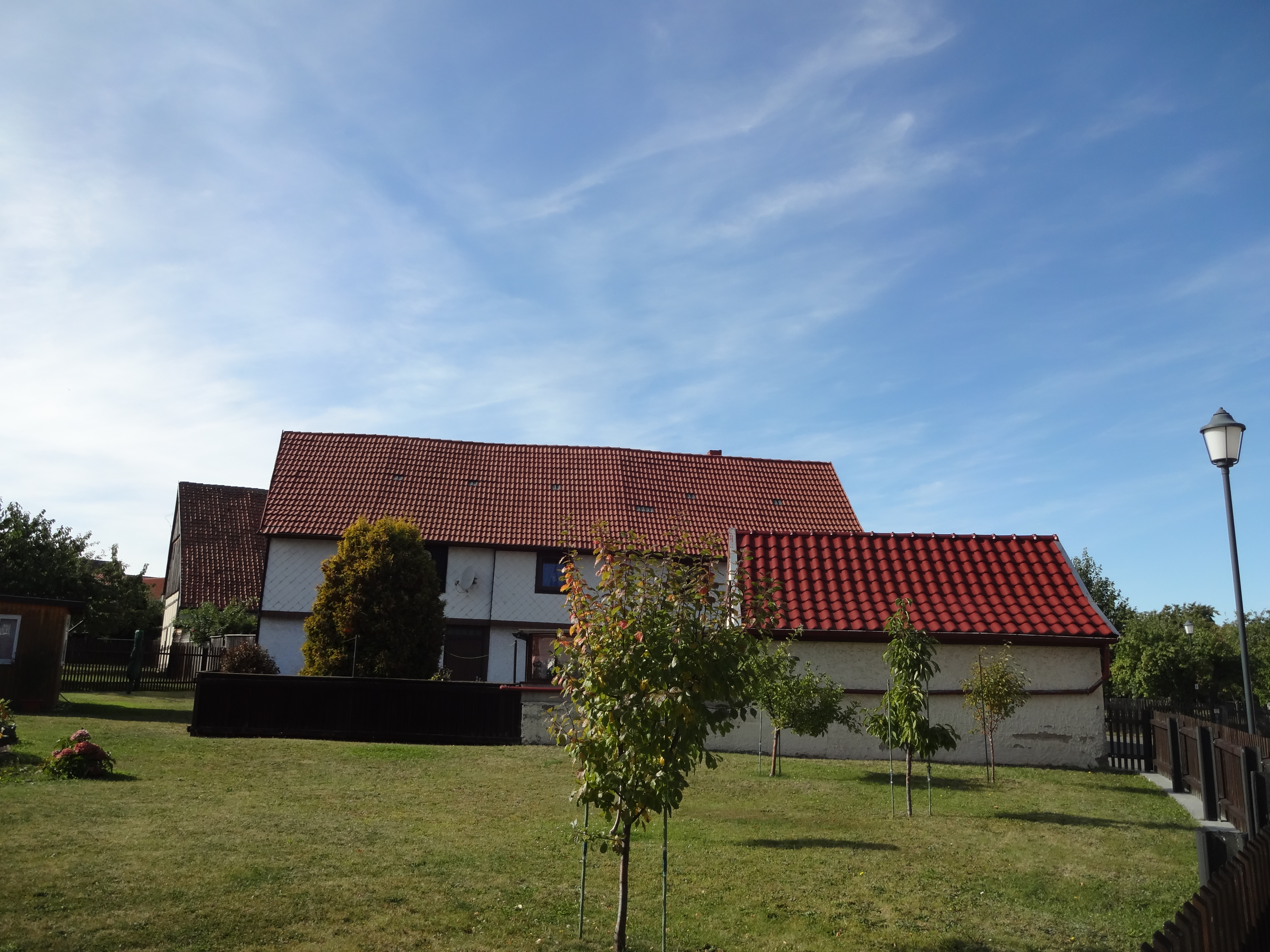 ehemals denkmalgeschütztes Bauernhaus in der Schmiedestraße 1 in Drübeck